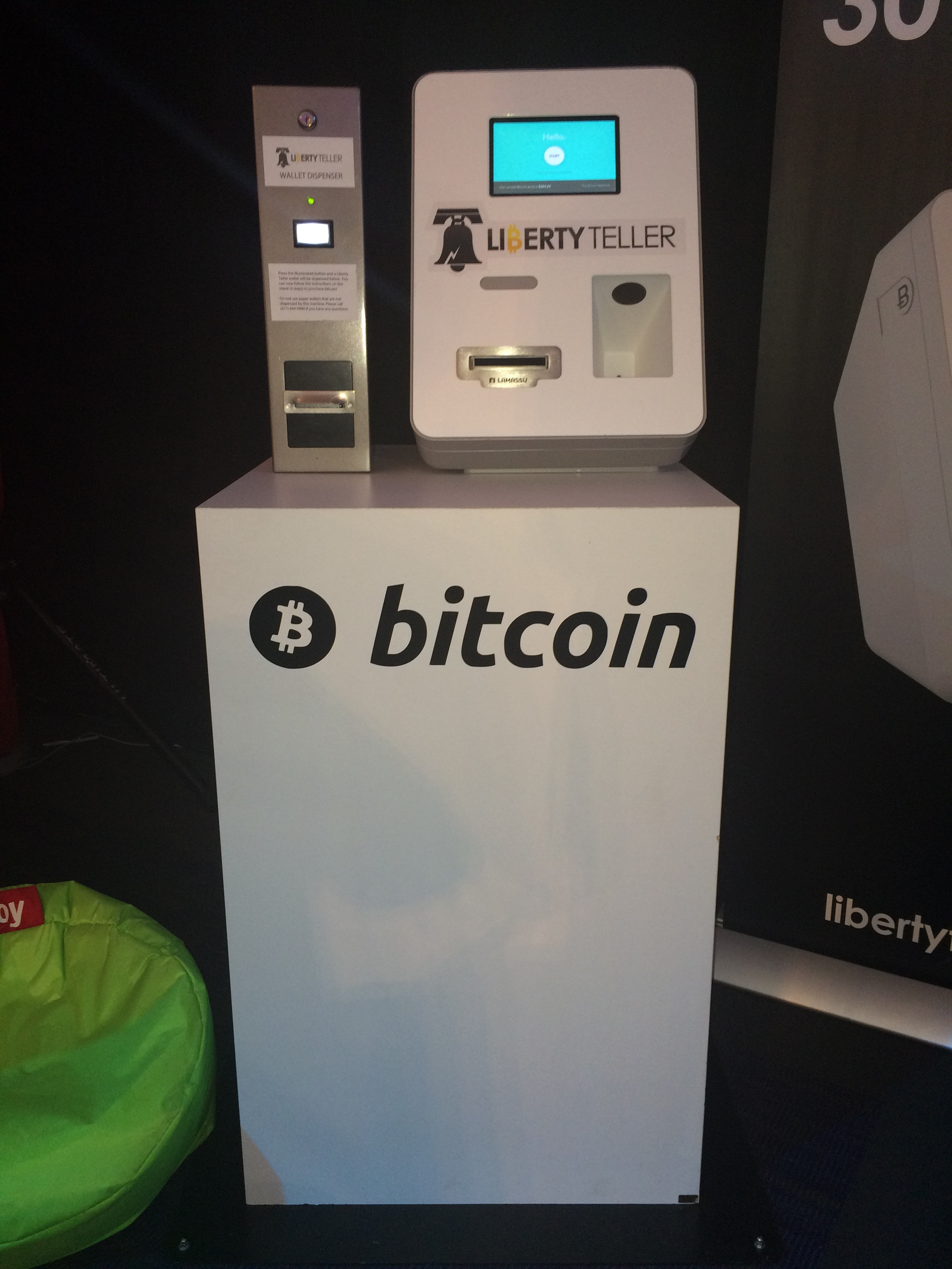 Bitcoin Wechsel Automat, aufgenommen an der SIBOS 2014 in Boston ( Convention Center)